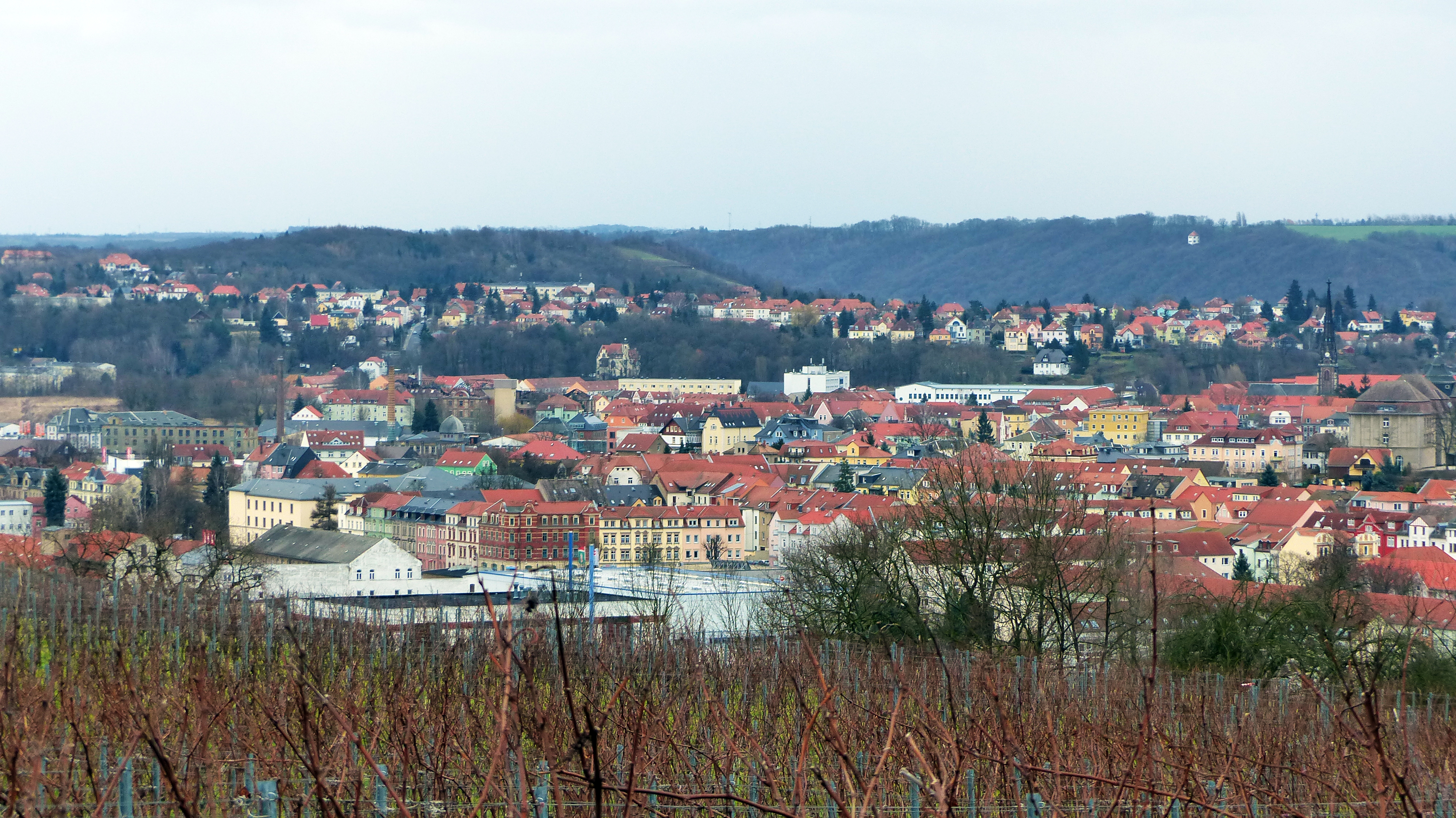 Blick von Proschwitz nach Süden auf die rechtselbisch gelegenen Stadtteile von Meißen Richtung Spaargebirge